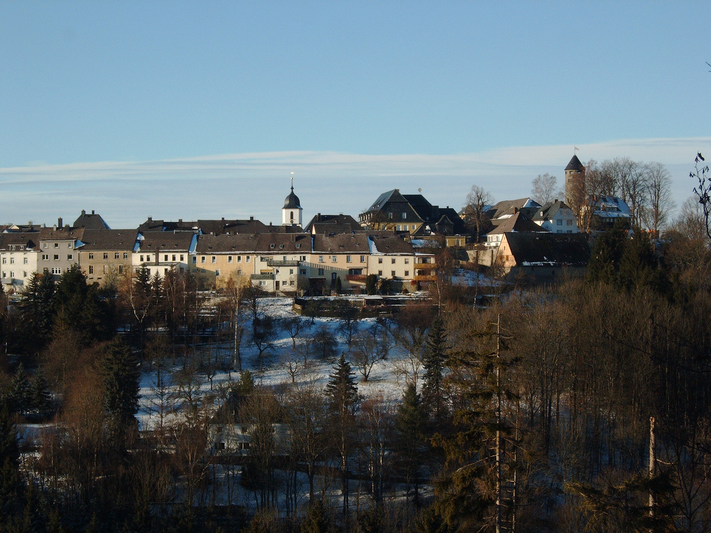 Blick auf die Stadt Lichtenberg (Oberfranken)